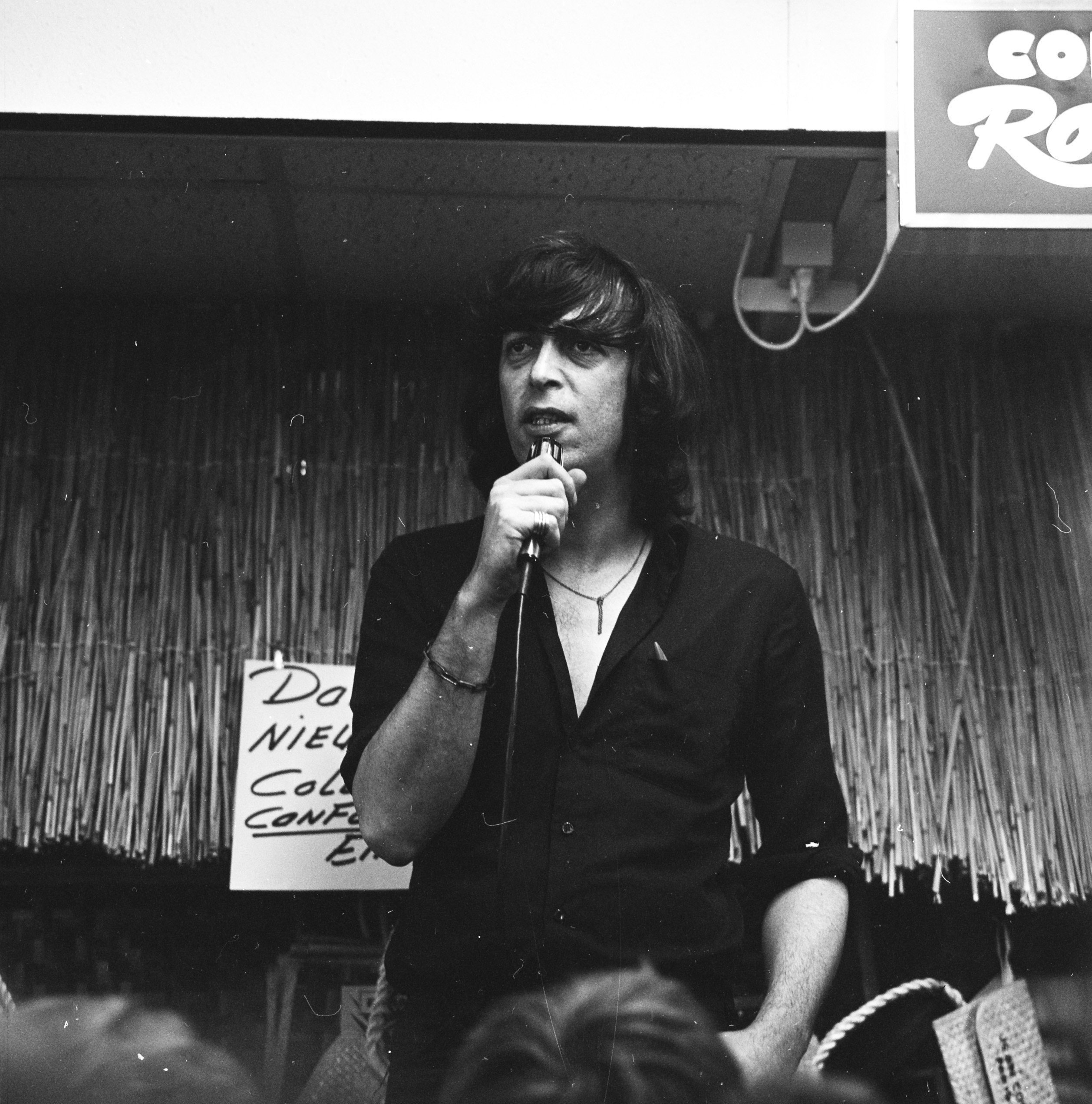 Collectie / Archief : Fotocollectie Anefo Reportage / Serie : [ onbekend ] Beschrijving : Zanger Tol Hansse op Nieuwendijkmarkt (Amsterdam) i.v.m actie "Amsterdam reuzenstad" Datum : 17 mei 1978 Locatie : Amsterdam, Noord-Holland Trefwoorden : Acties, zangers Fotograaf : Croes, Rob C. / Anefo Auteursrechthebbende : Nationaal Archief Materiaalsoort : Negatief (zwart/wit) Nummer archiefinventaris : bekijk toegang 2.24.01.03 Bestanddeelnummer : 929-7226